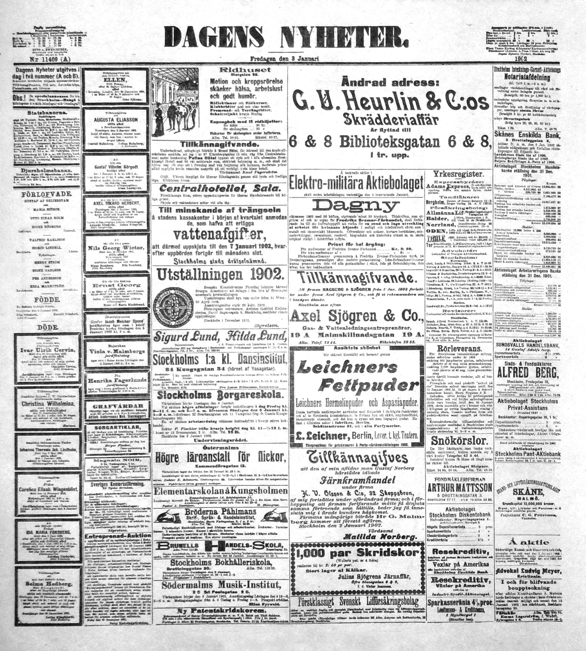 Dagens Nyheter, första sida den 3 januari 1902